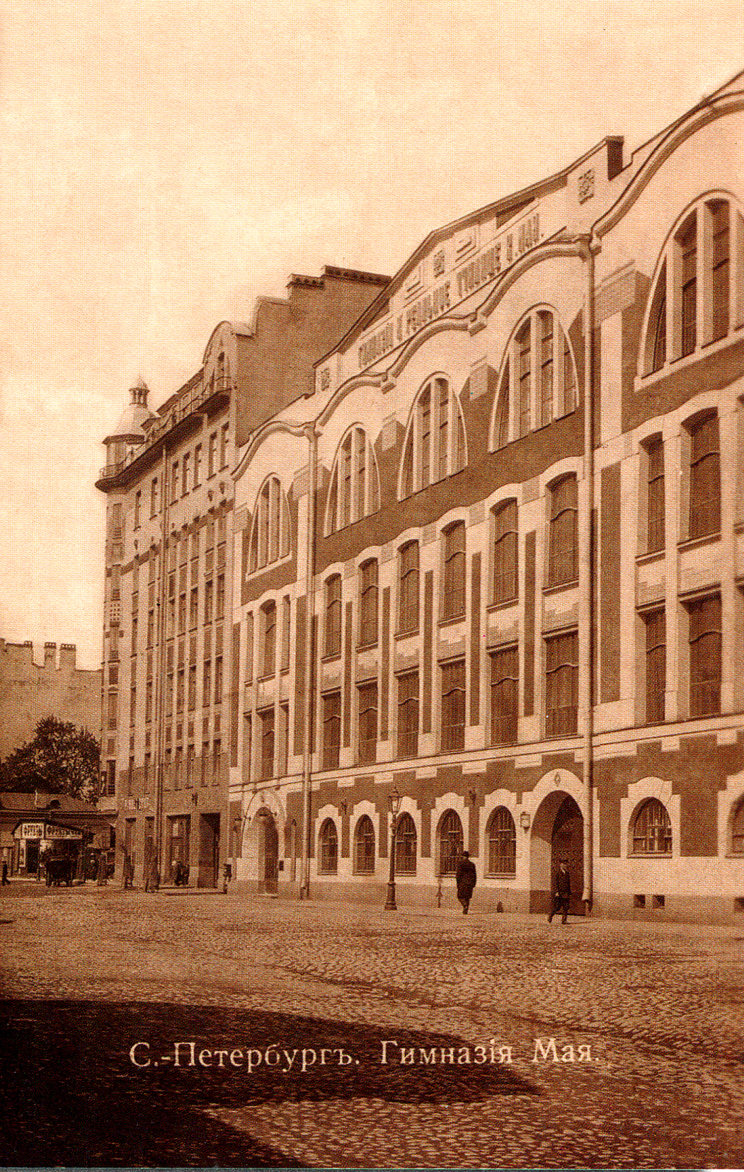 Гимназия Мая К.И.(В.О. 14 линия,д.39.